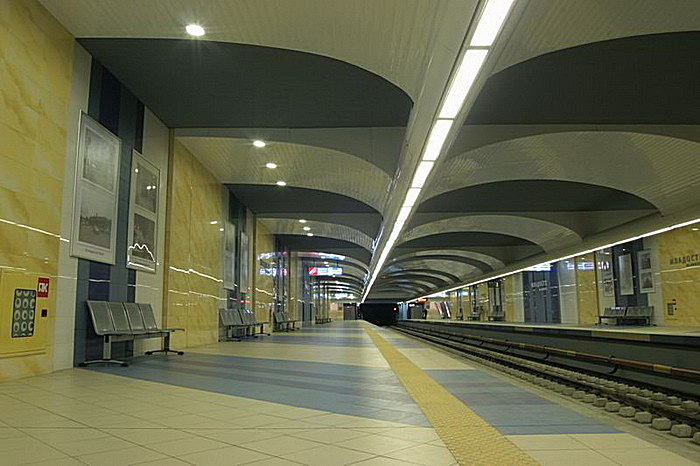 Младост 1 - перон